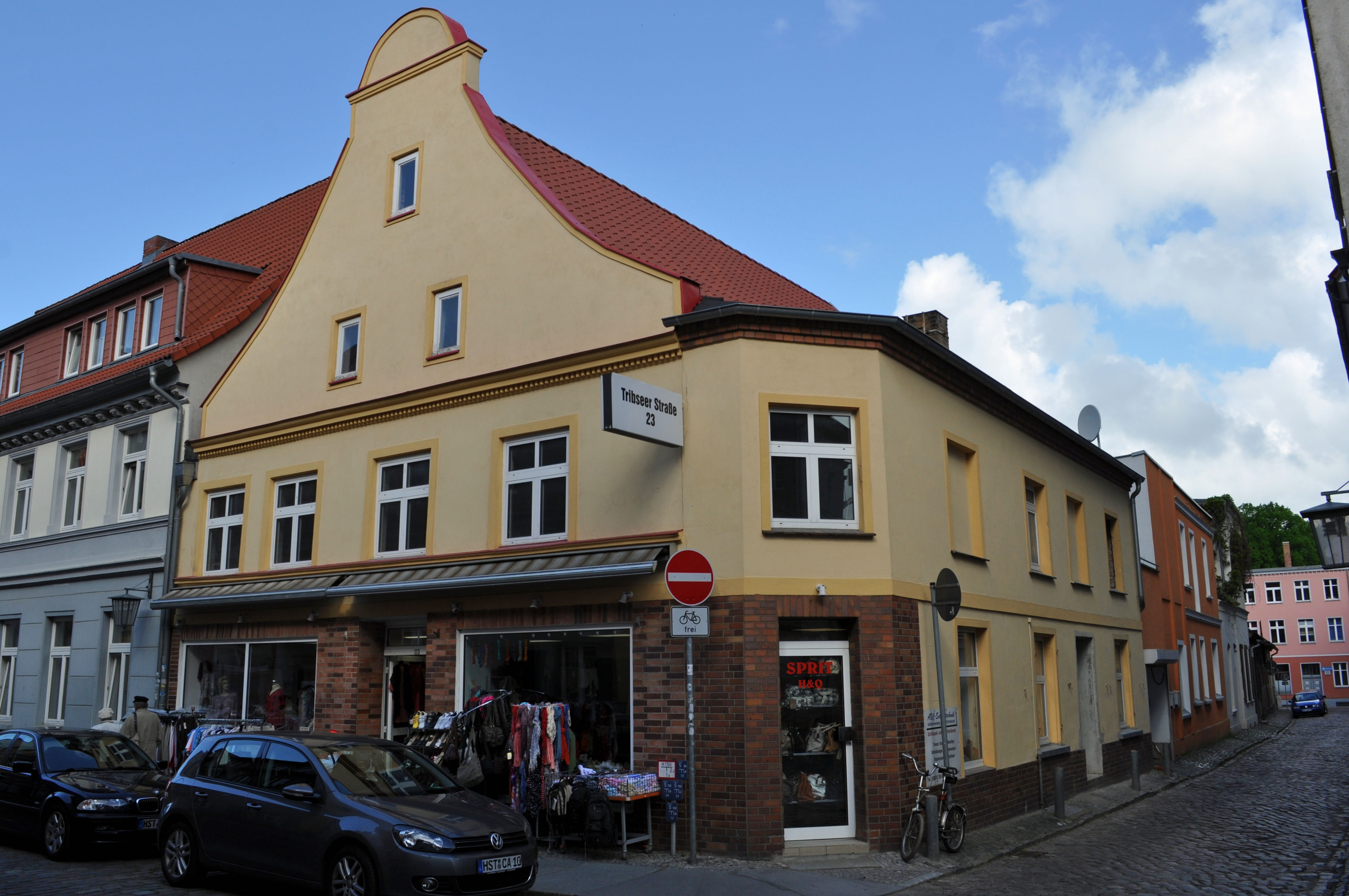 Gebäude in Stralsund, siehe Dateiname